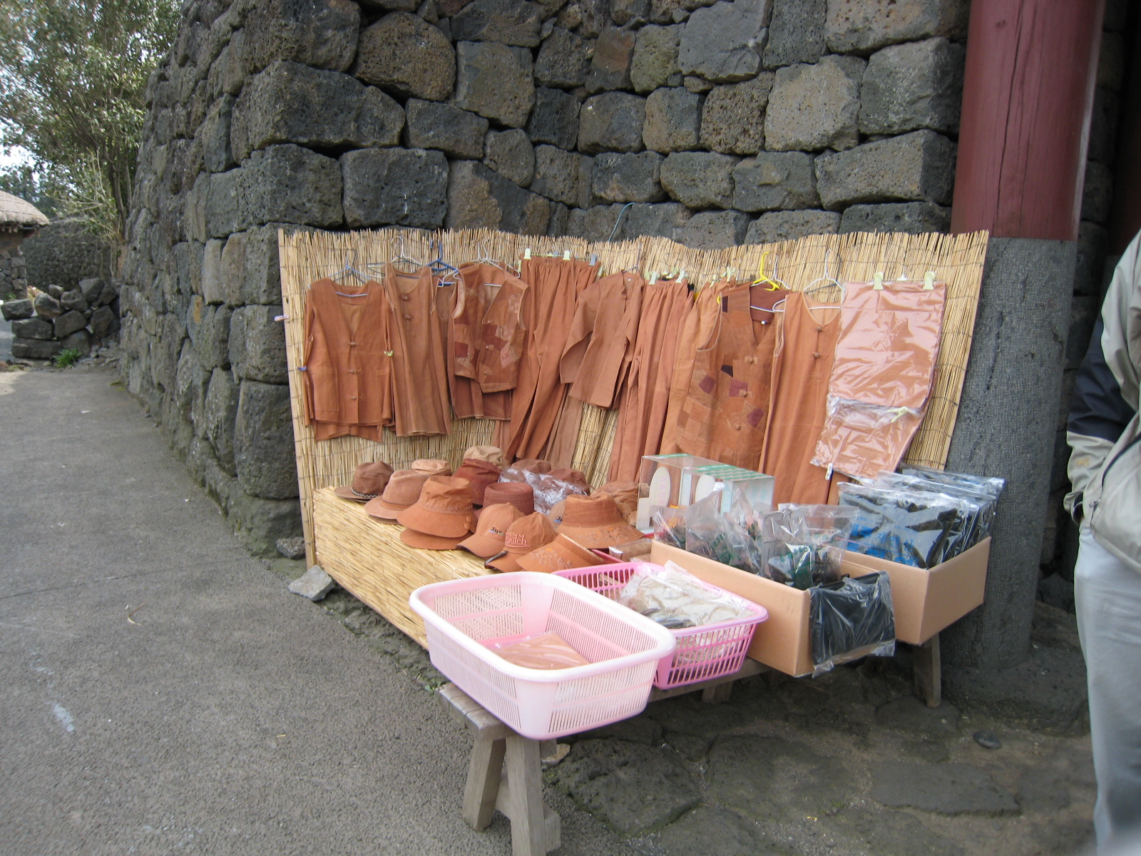 Galot